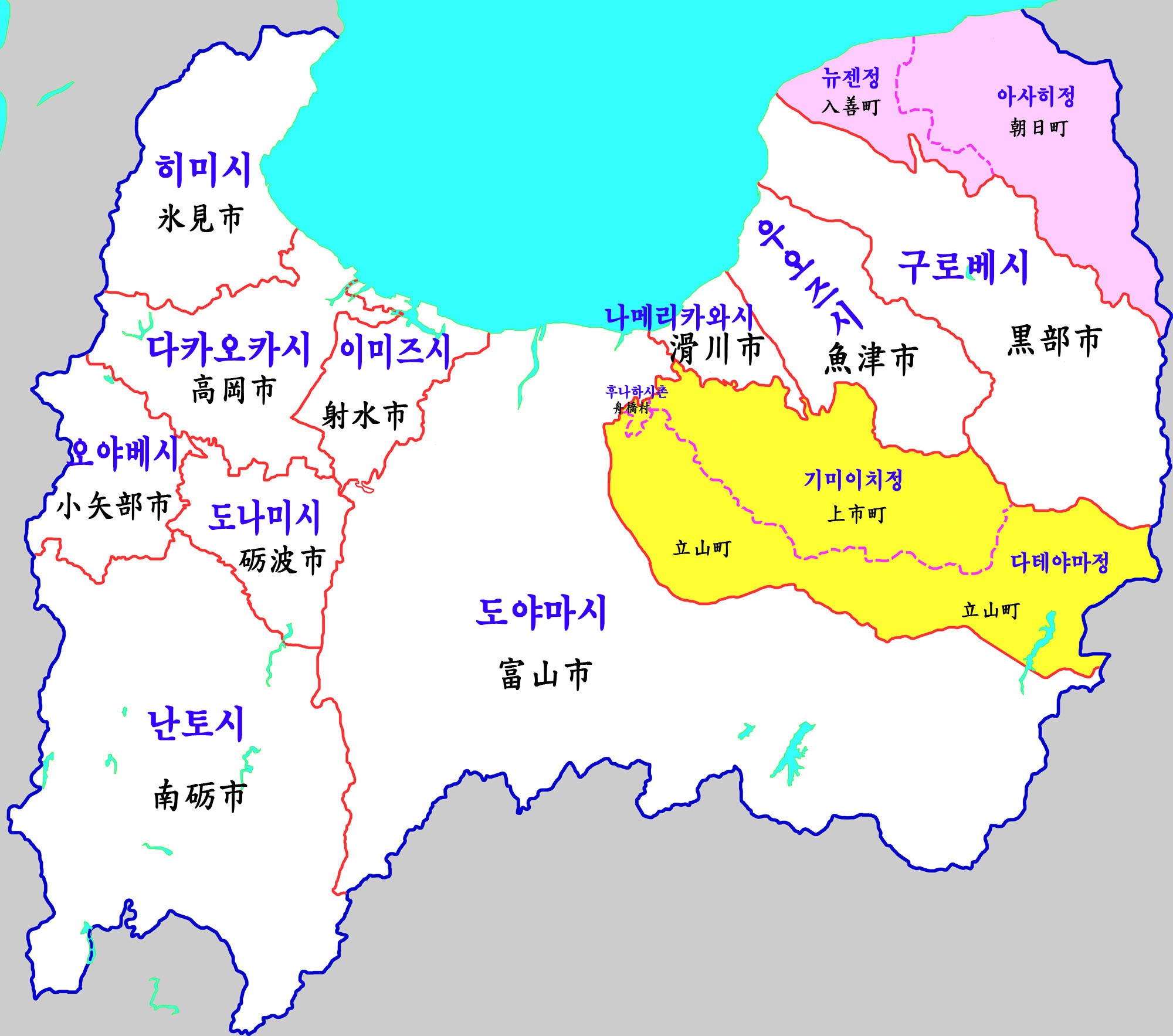 도야마현 행정구역